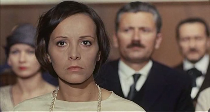 Screenshot del film Sacco e Vanzetti (1971) di Giuliano Montaldo.